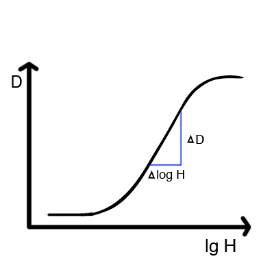 Gammakurve eines fotografischen Materials geringe Schöpfungshöhe, dann Urheber egal